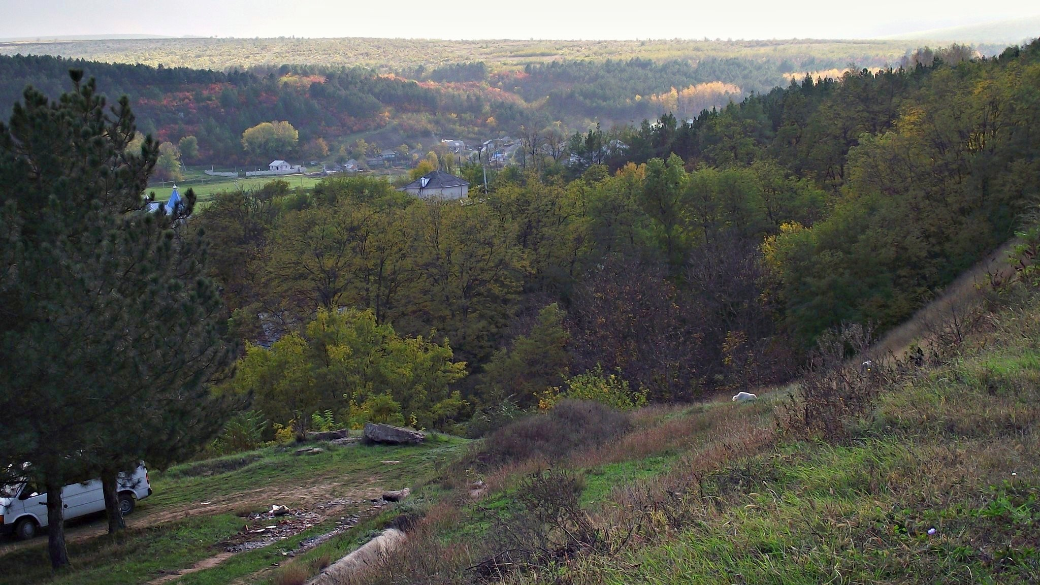 Hrușova, Moldova